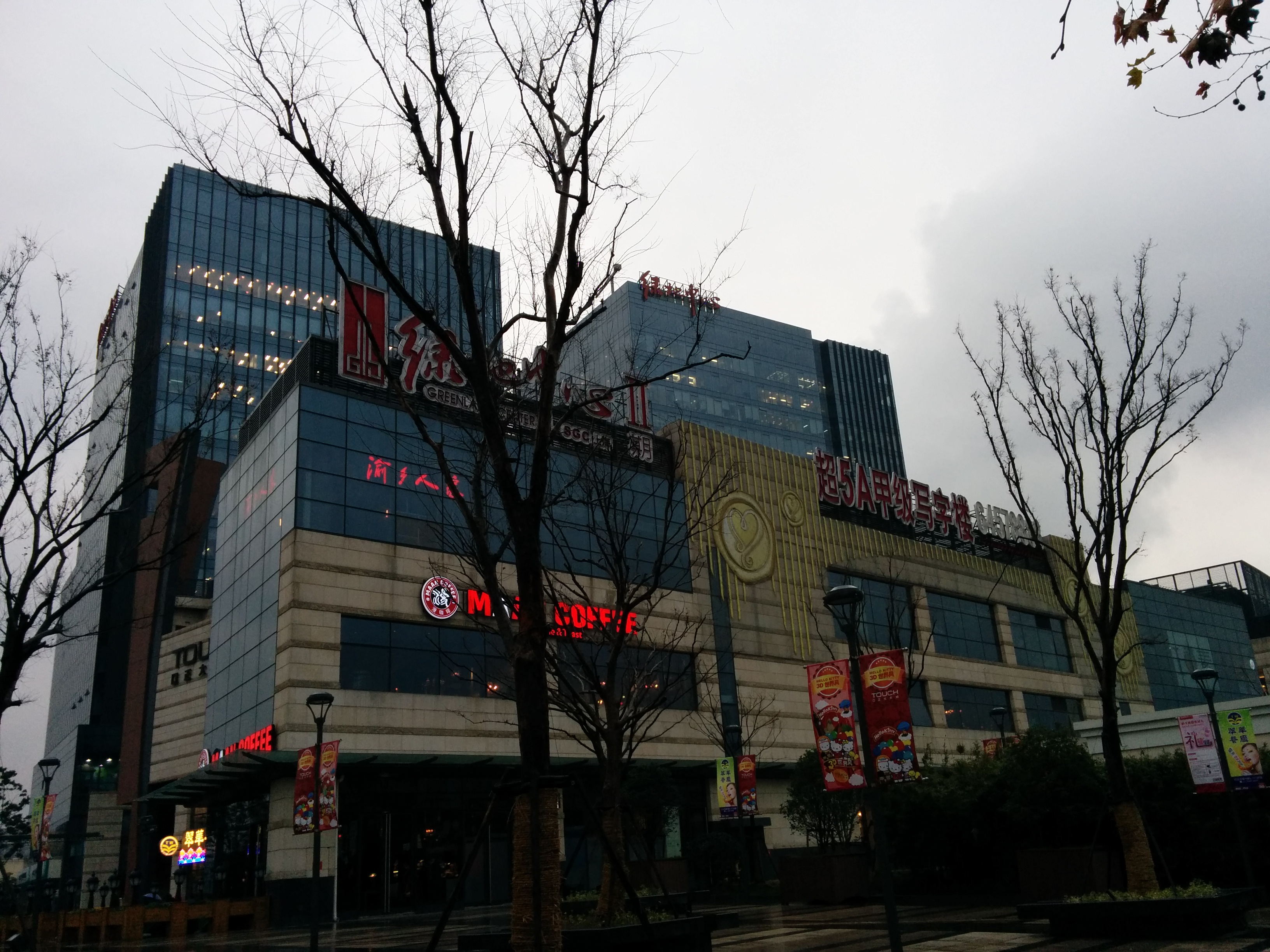 徐汇区上海绿地中心